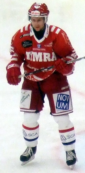 Ice hockey player Mikko Lehtonen of Timrå IK in Gärdehov, Sundsvall, Sweden